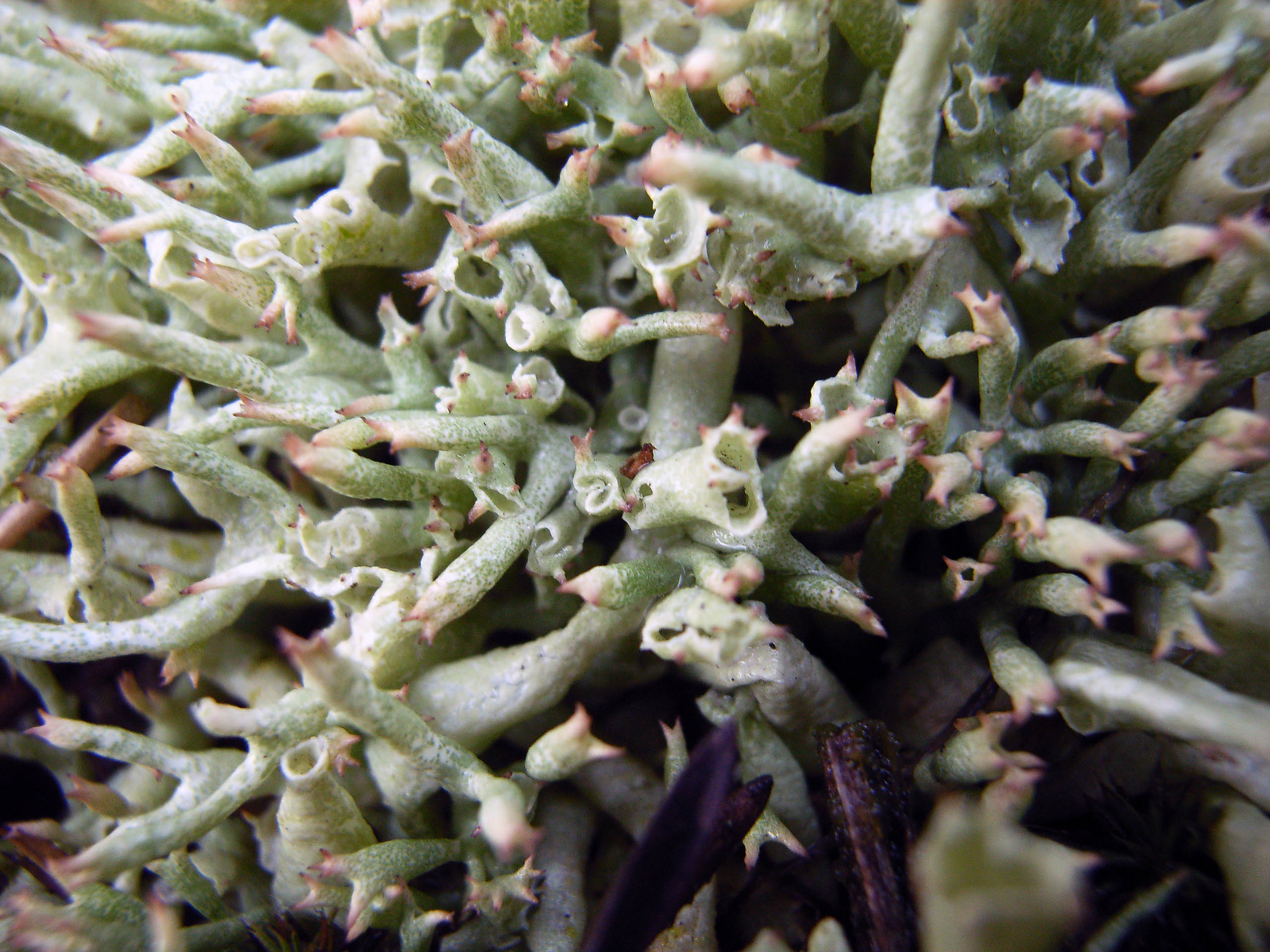 Igel-Cladonie (Cladonia uncialis), Binnendüne in Nordwestdeutschland